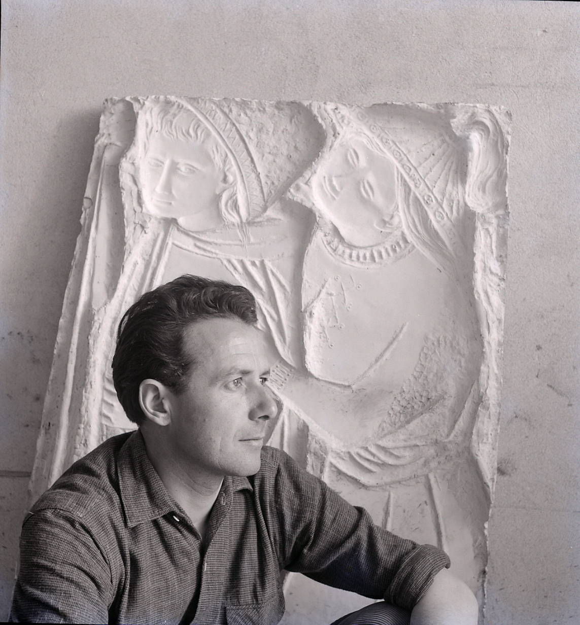 Servizio fotografico : Italia, 1965 / Paolo Monti. - Buste: 3, Fototipi: 3 : Negativo b/n, gelatina bromuro d'argento/ pellicola ; 6x6. - ((Serie costituita da 3 negativi identificati con i nn.: R14344-14346. Sulla busta del negativo R14344 manoscritto: "Rui". La suddetta serie è contenuta nella scatola identificata con la numerazione R14207/R14356. Sul coperchio della scatola, manoscritto a pennarello: "Ritratti".